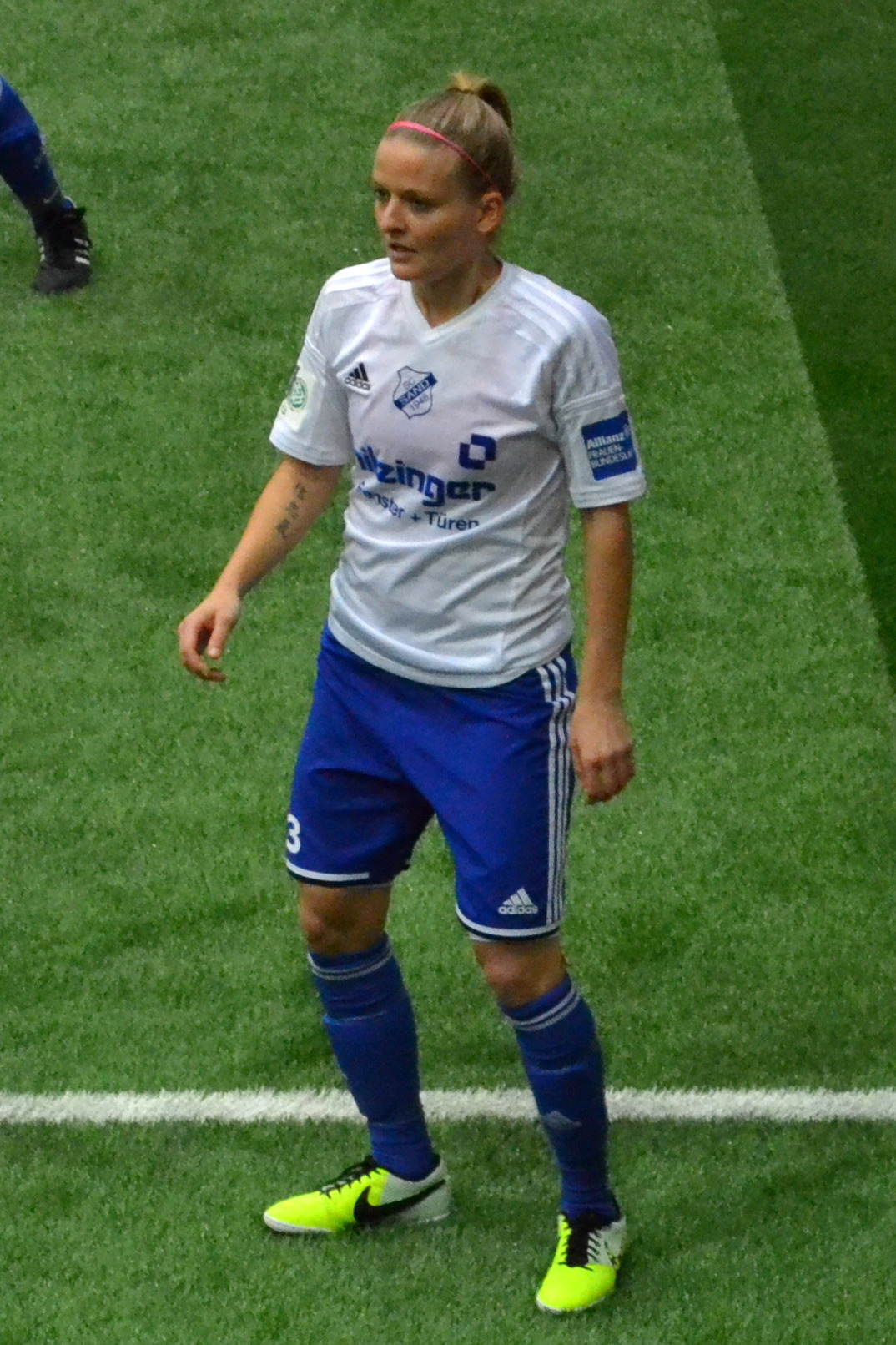 Isabelle Meyer (SC Sand) beim SAP Frauen-FußballCup 2016